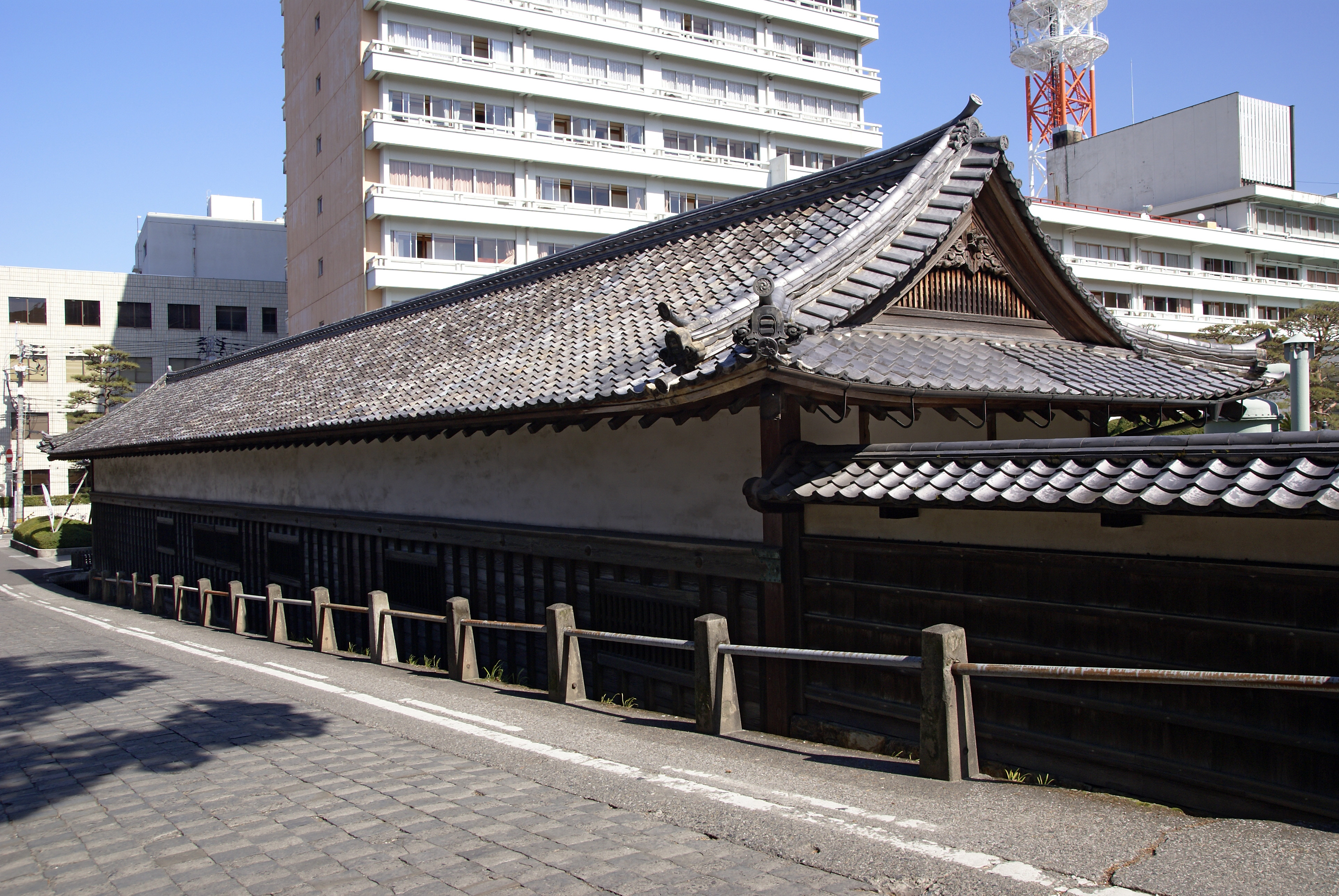 Kyu-Yamauchike Shimoyashiki Nagaya in Kochi, Kochi prefecture, Japan